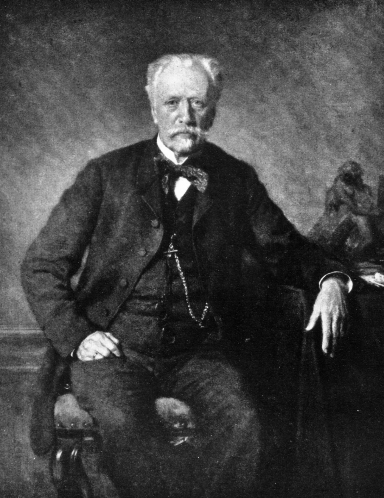 Friedrich Krüger (* 22. September 1819 in Lübeck; † 17. Januar 1896 in Berlin), Jurist und hanseatischer Diplomat